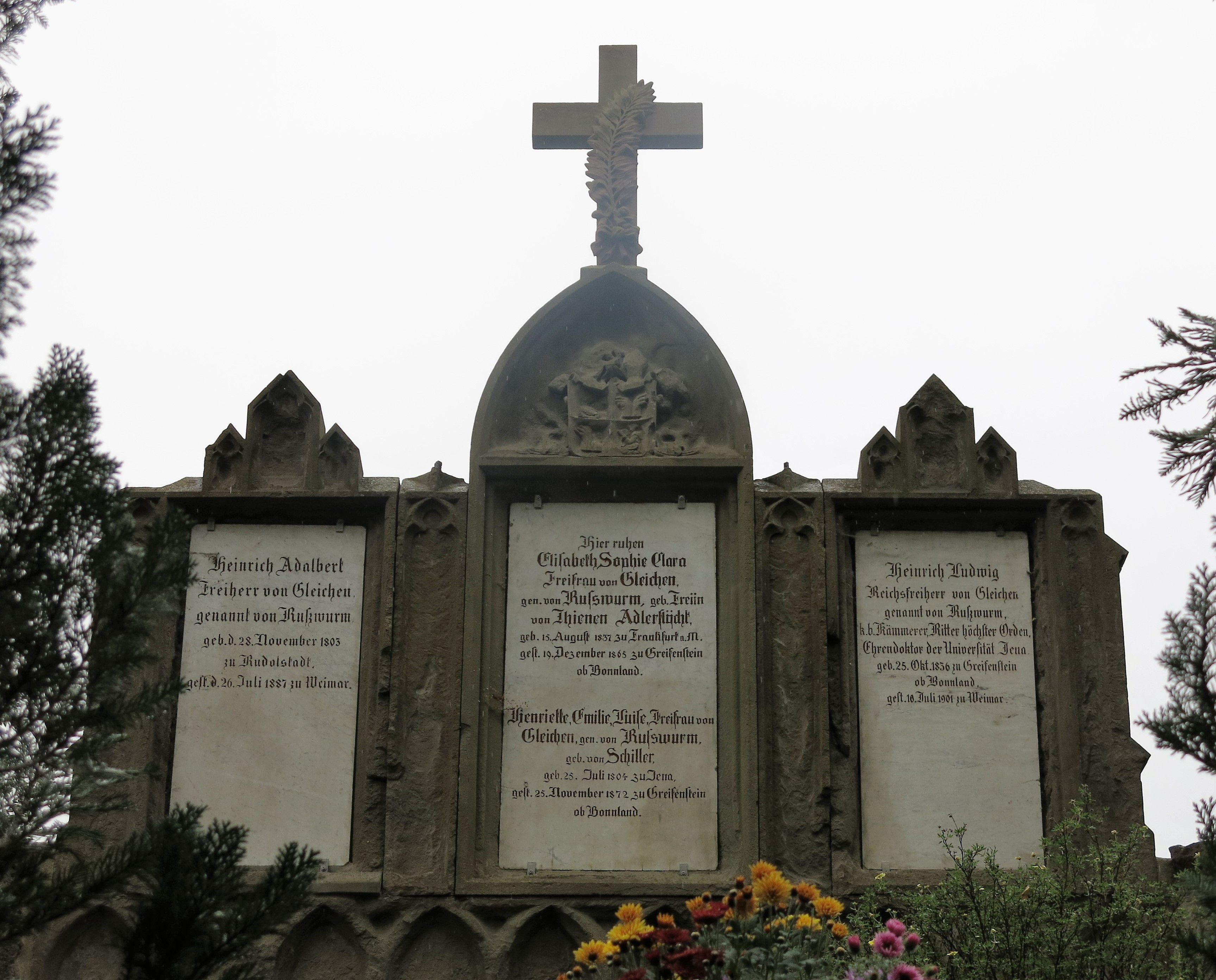 Grabstein der Freiherren von Gleichen-Rußwurm auf dem Friedhof in Bonnland (mit Schillers Tochter)